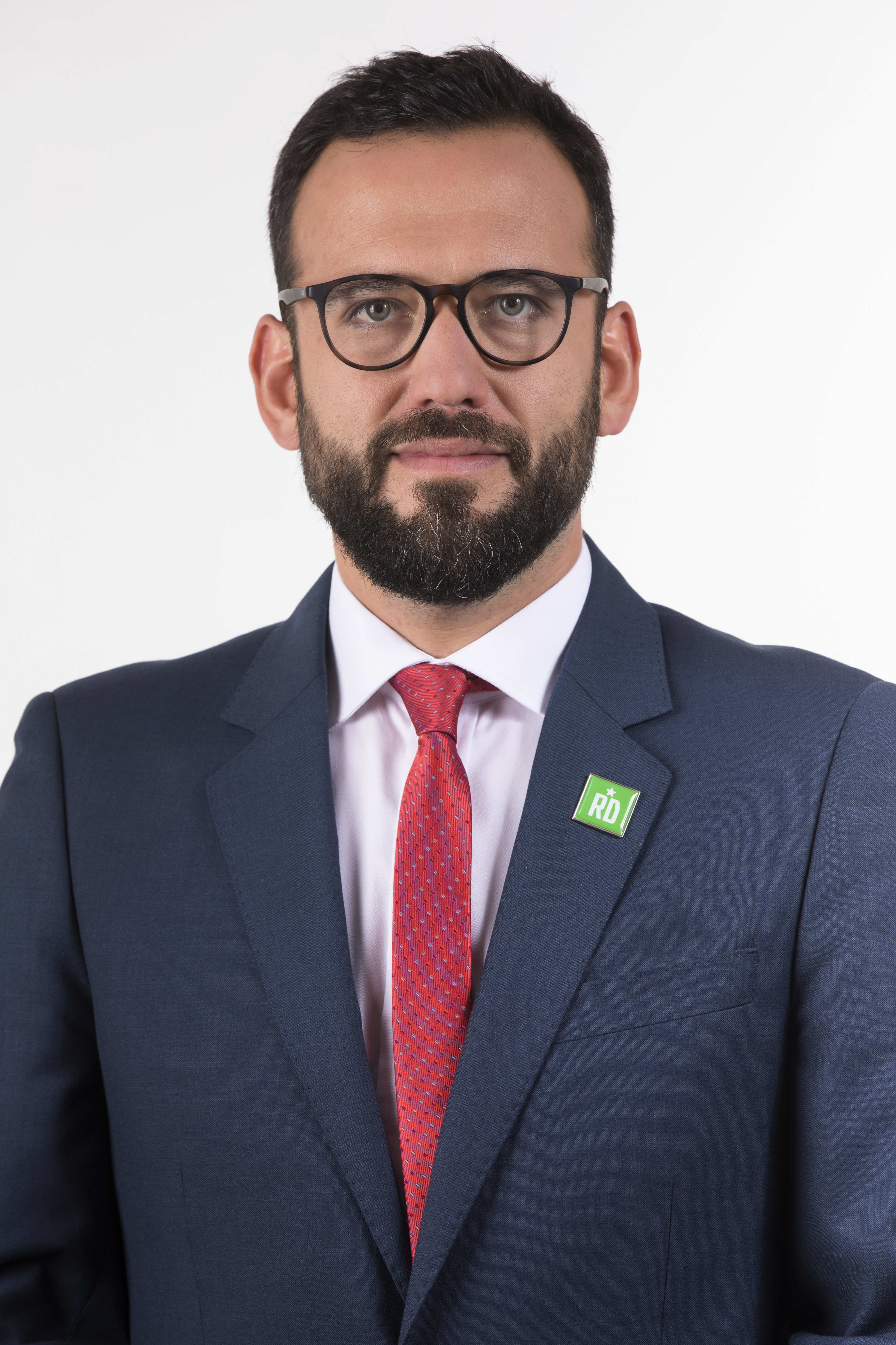 Pablo Vidal Rojas en la fotografía oficial de diputados periodo 2018-2022. (Fotos: Christel Andler, René Lescornez, Johanna Zárate)